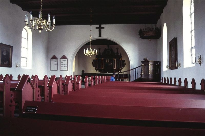 Almind Kirke (Kolding Kommune) i Danmark. Skibet set mod øst